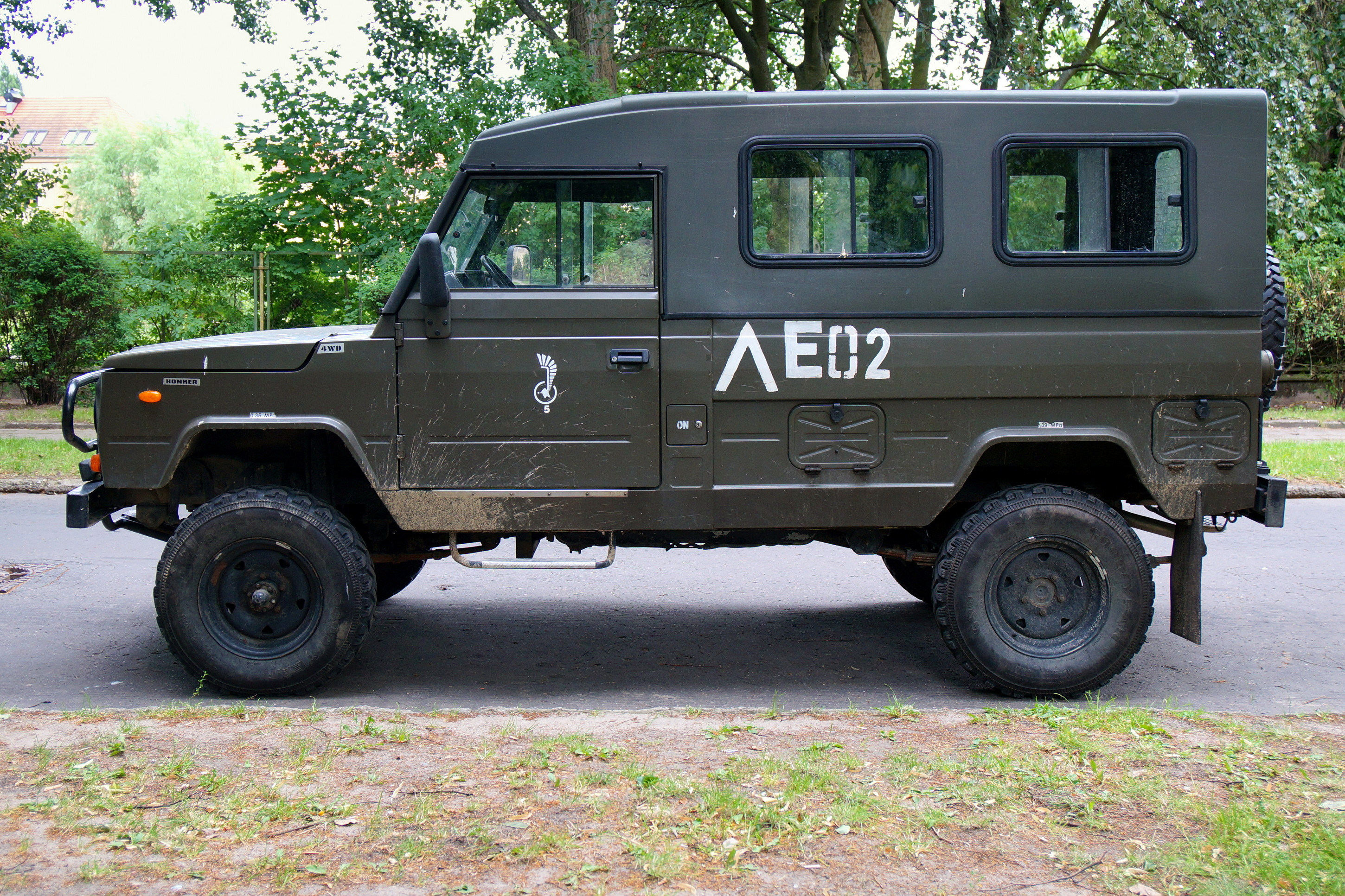 Tarpan Honker